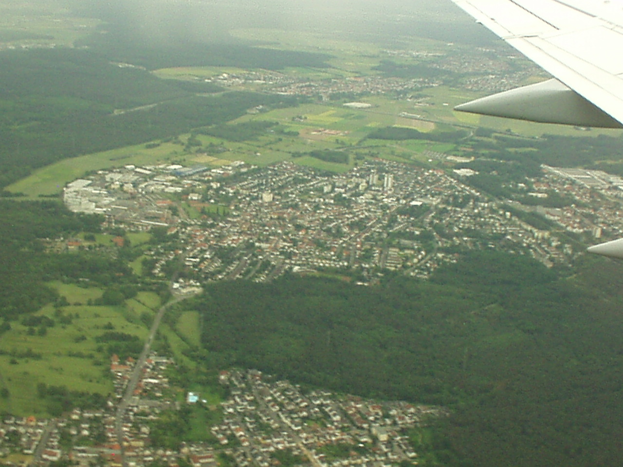 Obertshausen